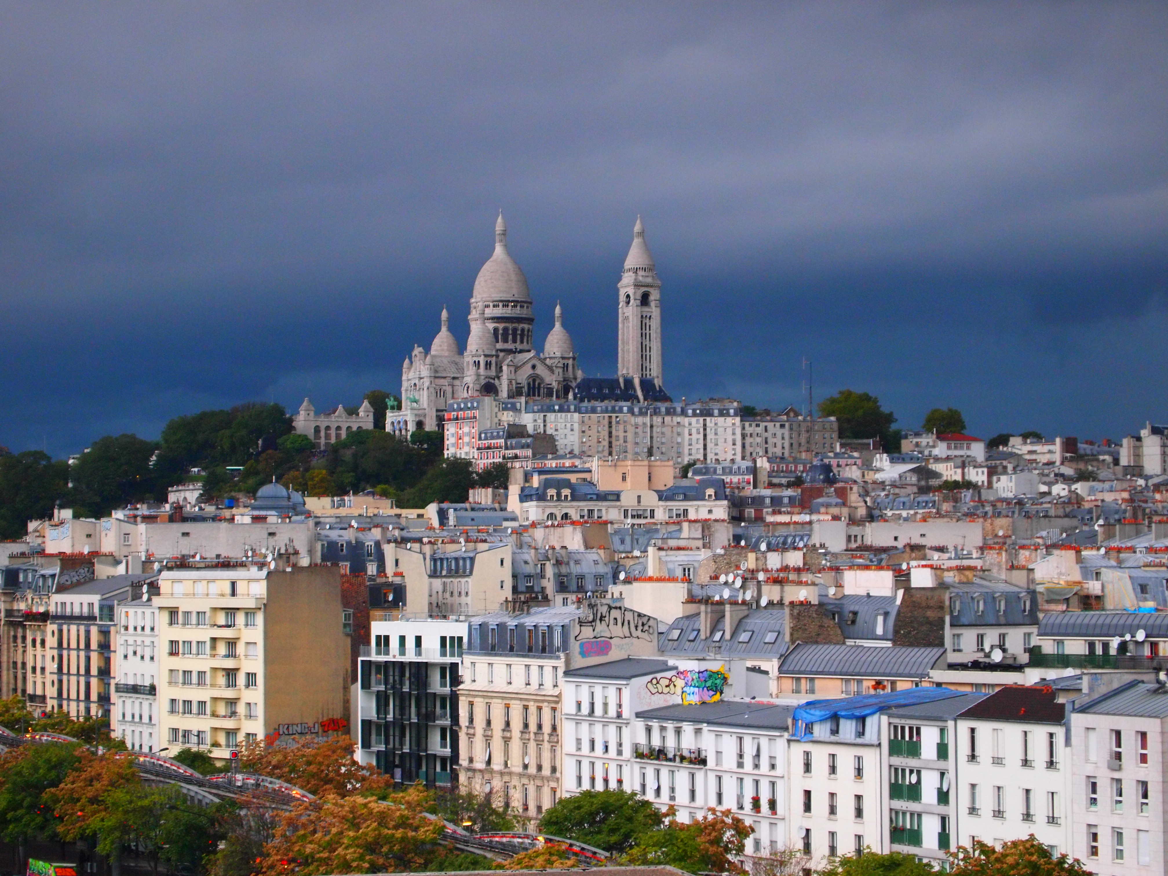 Sacré-Cœur, Paris.